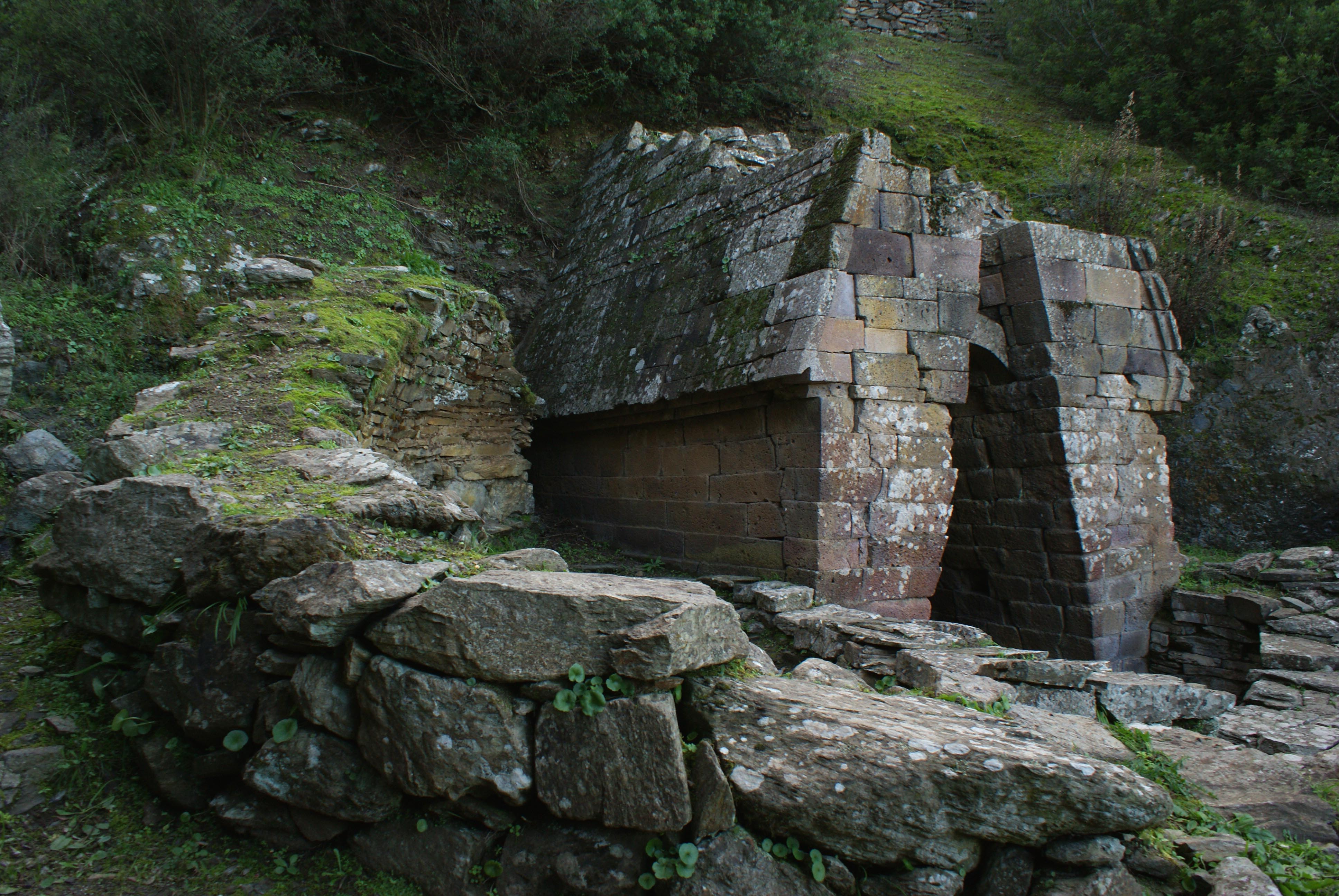 fonte sacra Su Tempiesu - Orune This is a photo of a monument which is part of cultural heritage of Italy.